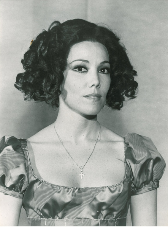 Film “Rugantino” (ruolo di Donna Marta Capitelli) Regia di Pasquale Festa Campanile Foto: Grazia Maria Spina